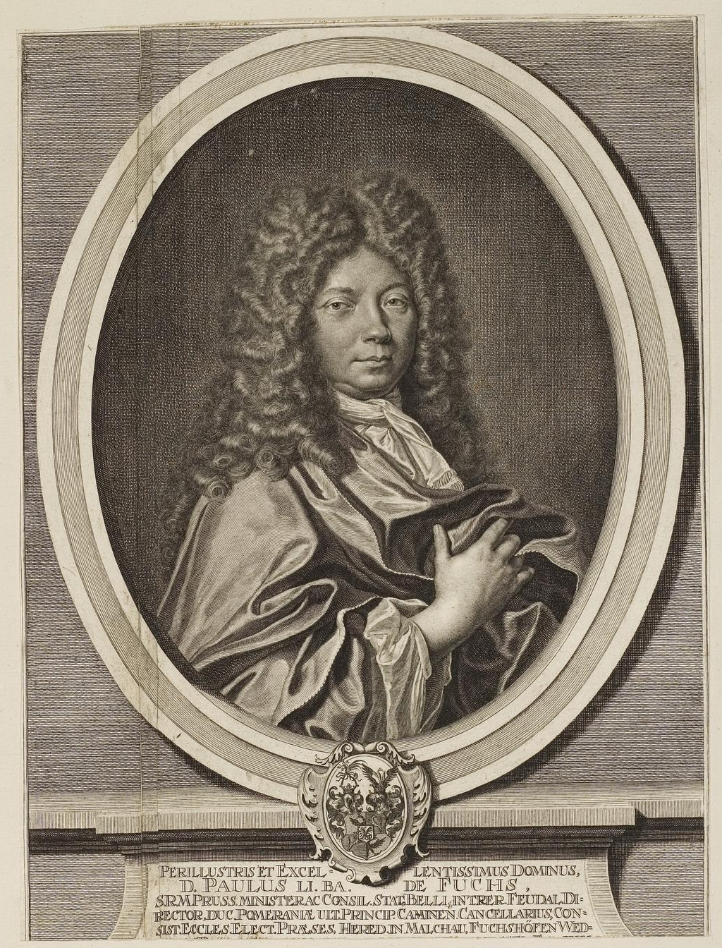 Grafik aus dem Klebeband Nr. 1 der Fürstlich Waldeckschen Hofbibliothek Arolsen Motiv: Paul von Fuchs, brandenburgisch-preußischer Minister